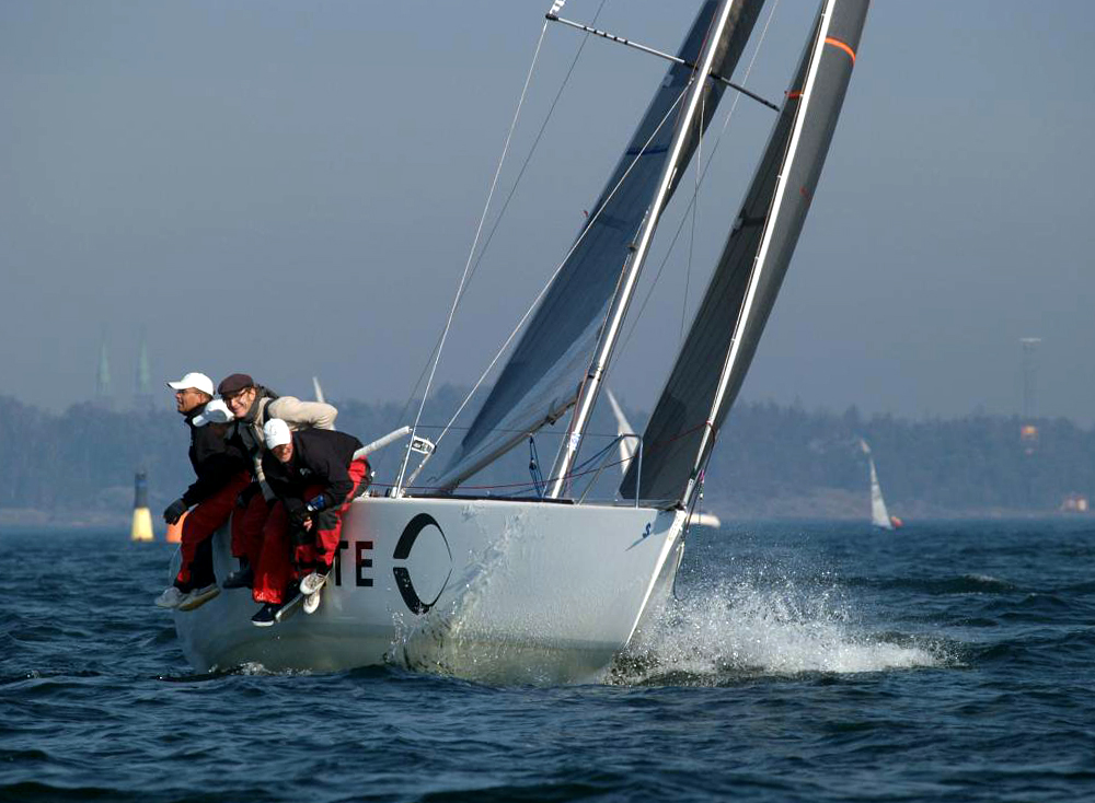 Platu 25, purjehduskilpailu, Suomen Urheiluveneliitto, Helsinki